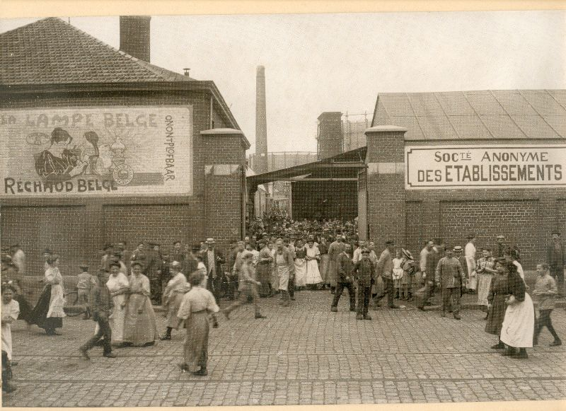 Sortie des Établissements Lempereur & Bernard au alentour de 1900